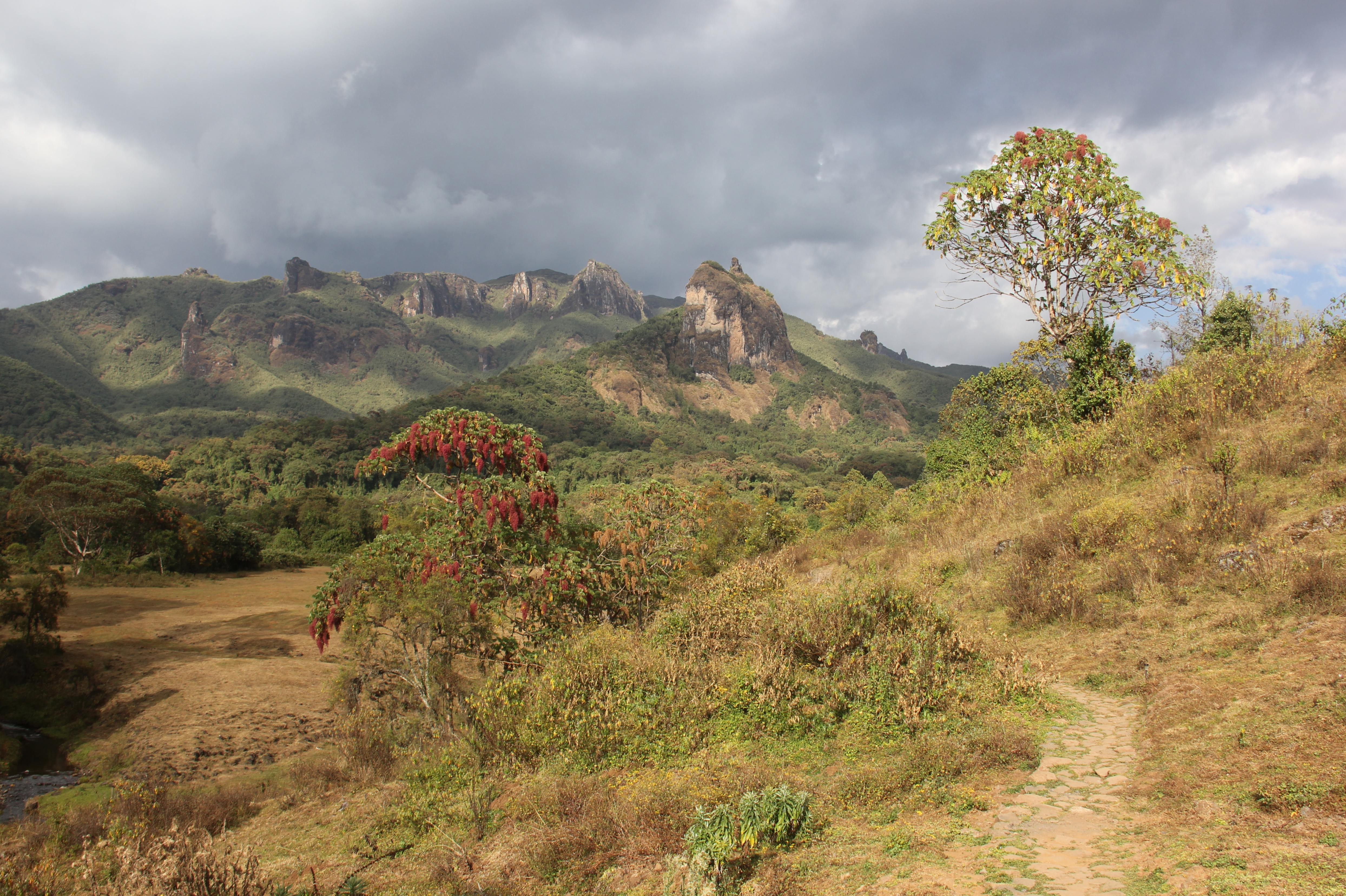 Harenna Forest